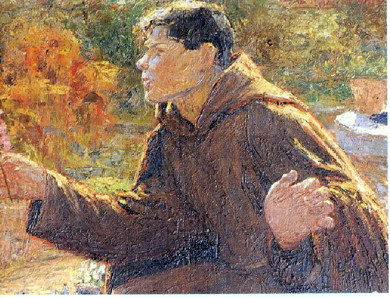 La foto rappresenta l'opera di Fra Paolo - Augusto Mussini descritta nel titolo, conservata nella chiesa dei Cappuccini di Ascoli Piceno.